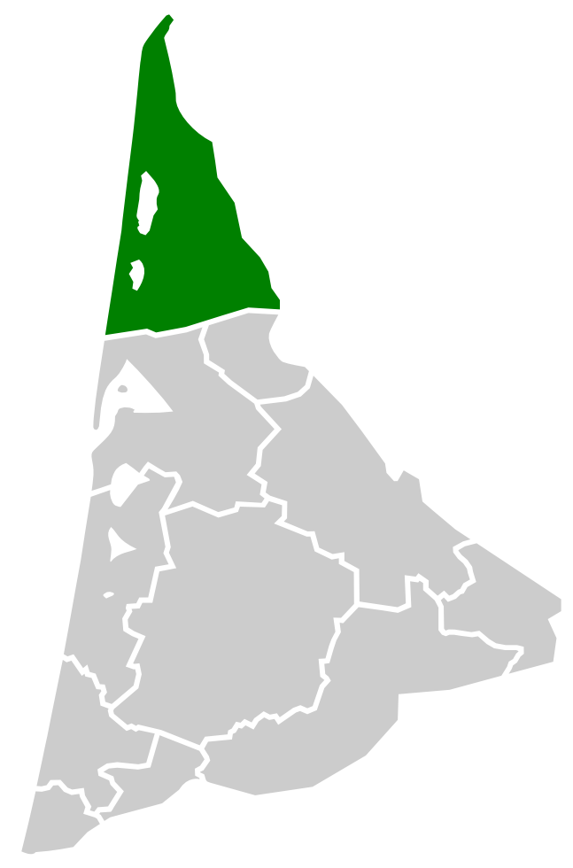 Localisation des Landes du Médoc